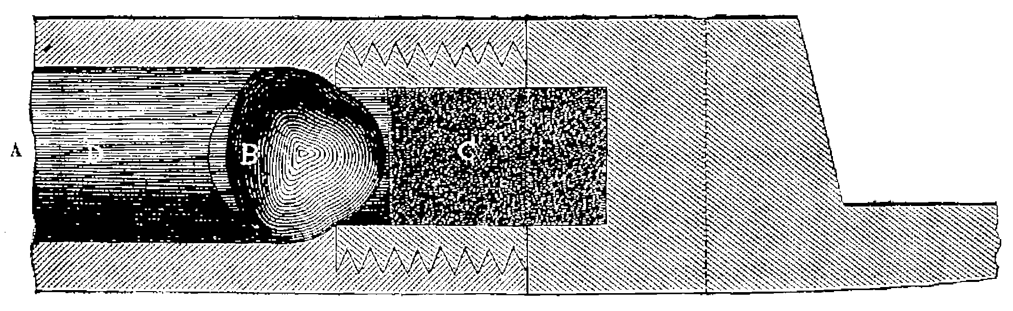 Section longitudinale de la carabine Delvigne